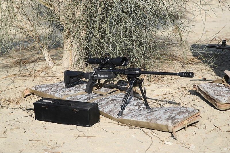 سلاح تک تیرانداز طاهر - محمد رسول‌الله(ص) ۴